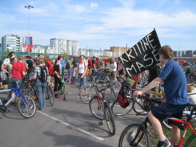 Kritinė Masė Vilniuje 2005-05-27